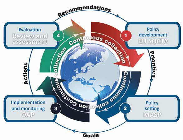 4 langkah UE dalam menangani kejahatan serius dan terorganisir